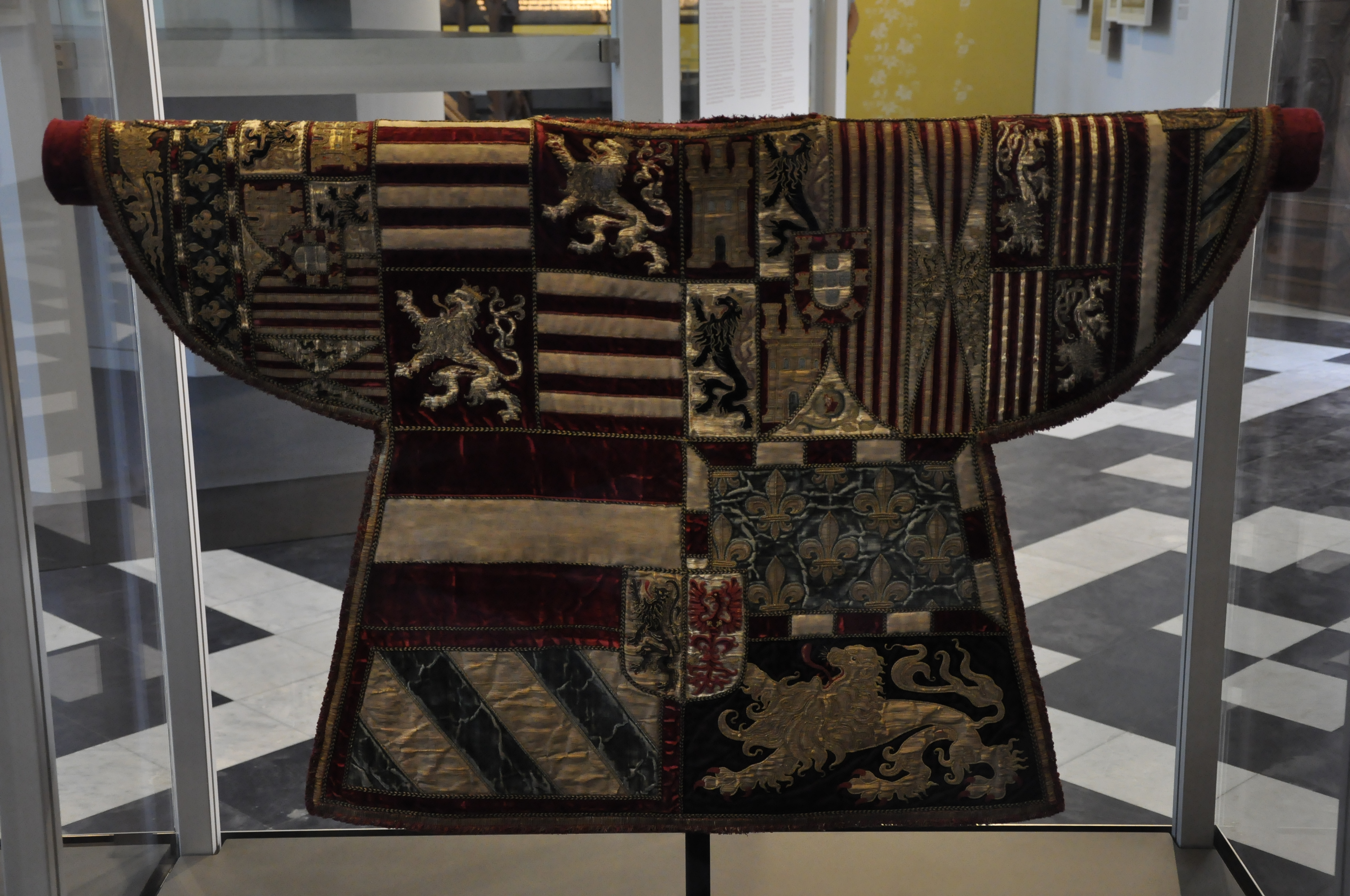 Stadsmuseum Gent, wapenrok van een heraut uit de 17e eeuw, met de wapens van Filips II